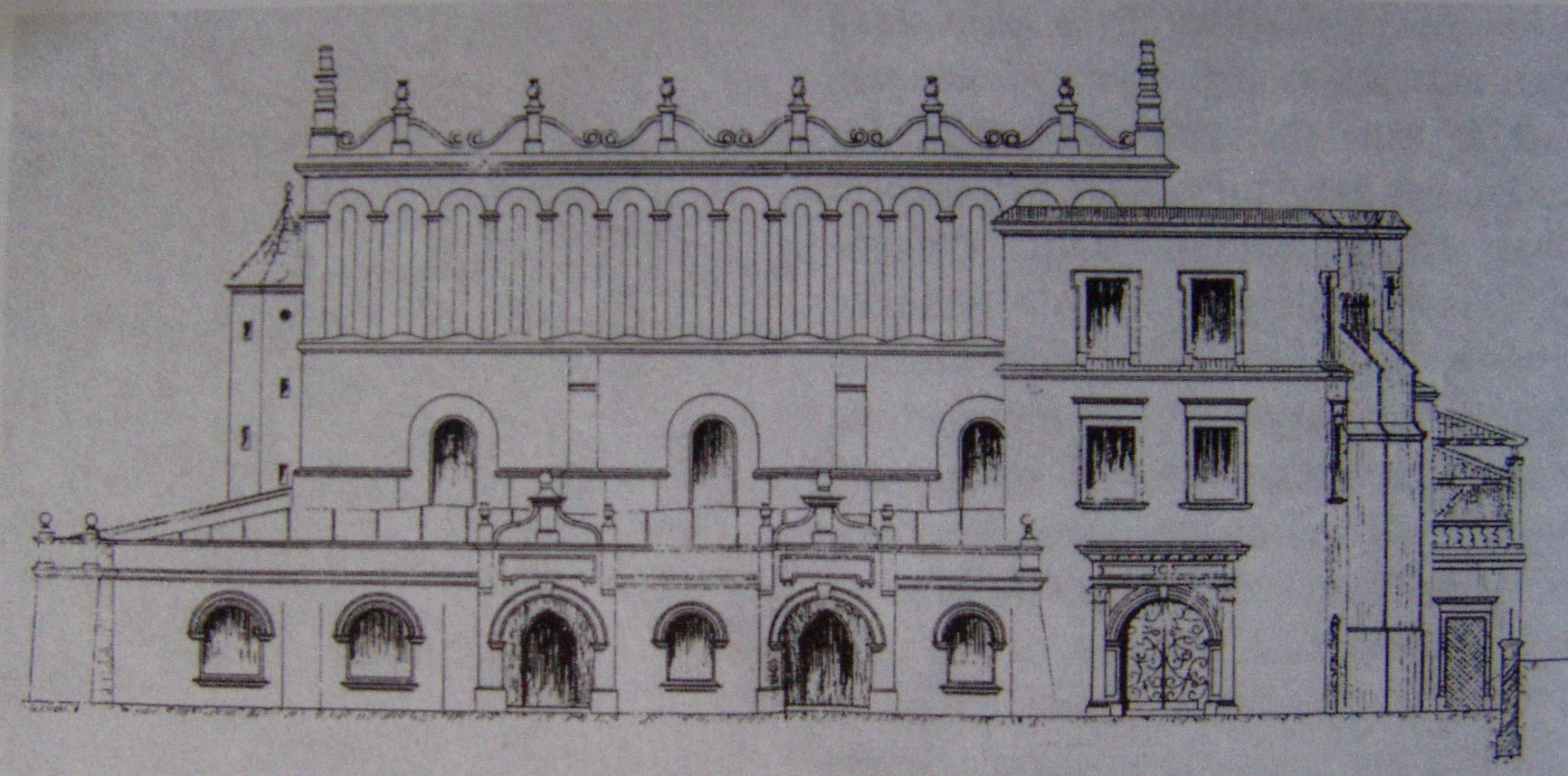 Projekt restauracji Starej Synagogi w Krakowie (1904)